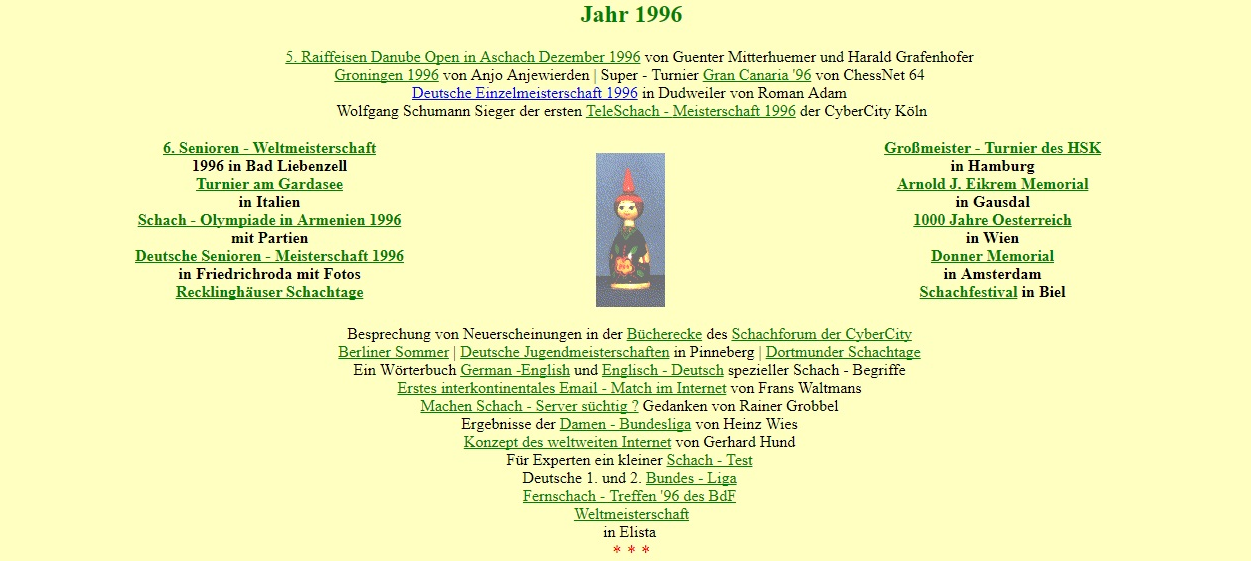 Die Webseite "Schach aktuell" aus dem Jahr 1996 des Internetportals TeleSchach.